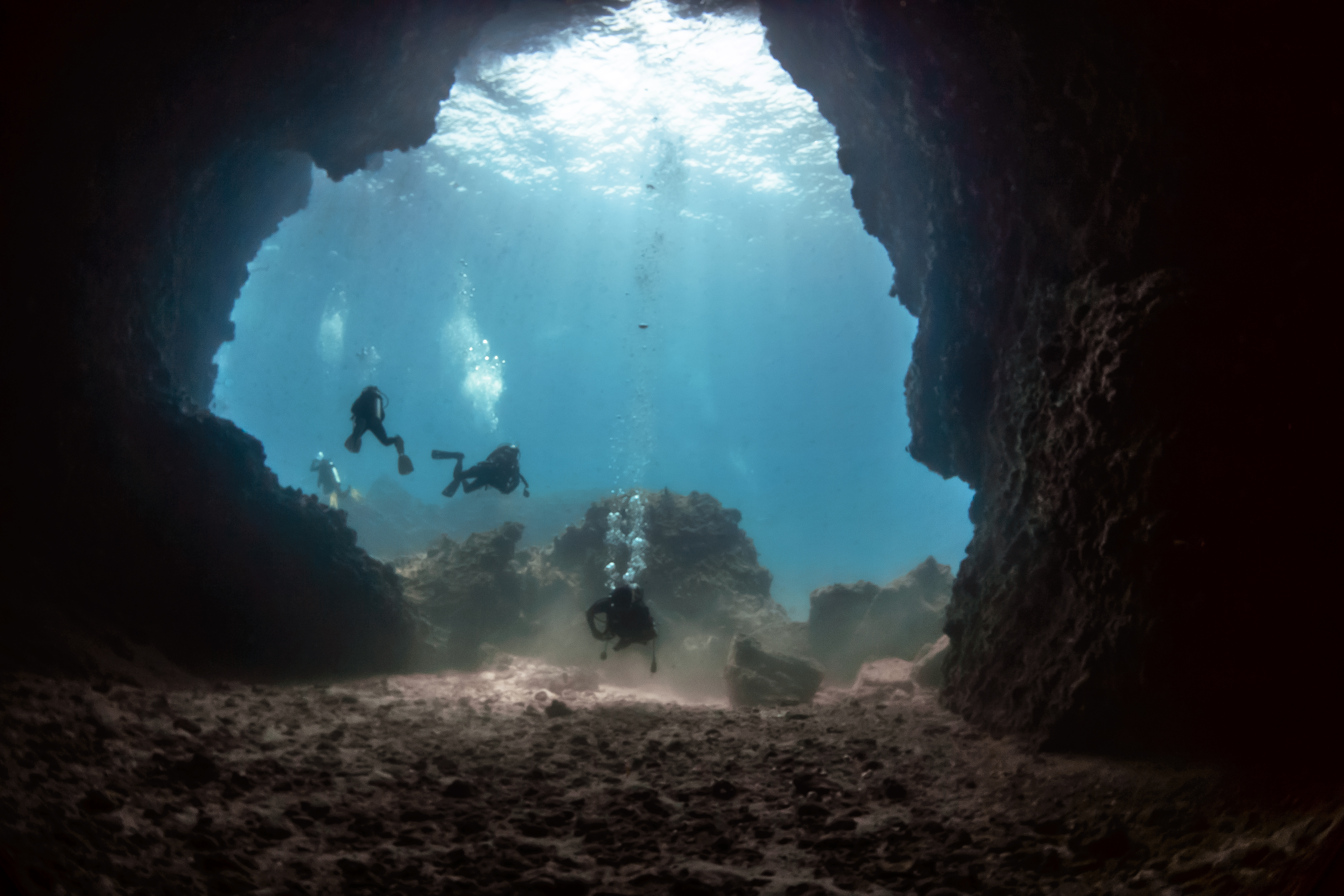 อุทยานแห่งชาติหมู่เกาะลันตา